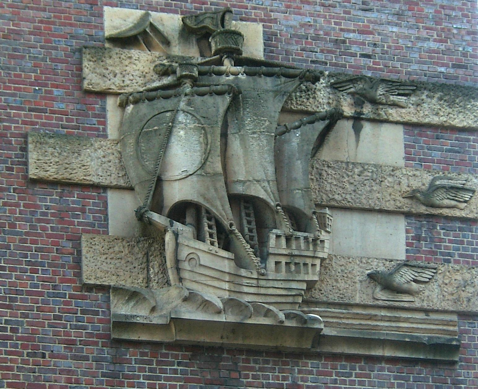 Die Tageblattkogge (Emblem des nationalsozialistischen „Hamburger Tageblatts“) am Pressehaus in Hamburg-Altstadt wurde von Richard Kuöhl geschaffen. This is a photograph of an architectural monument.